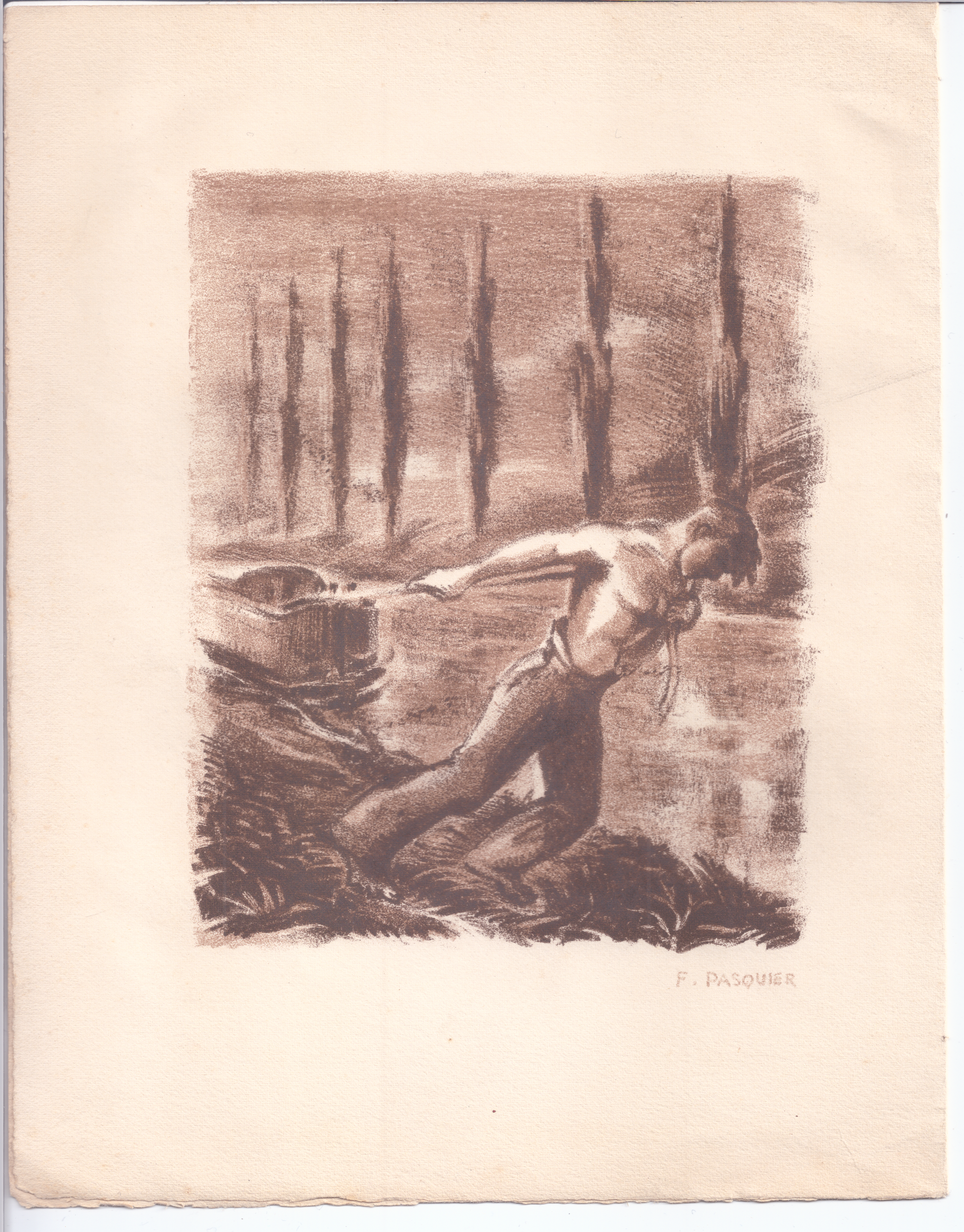 Sanguine